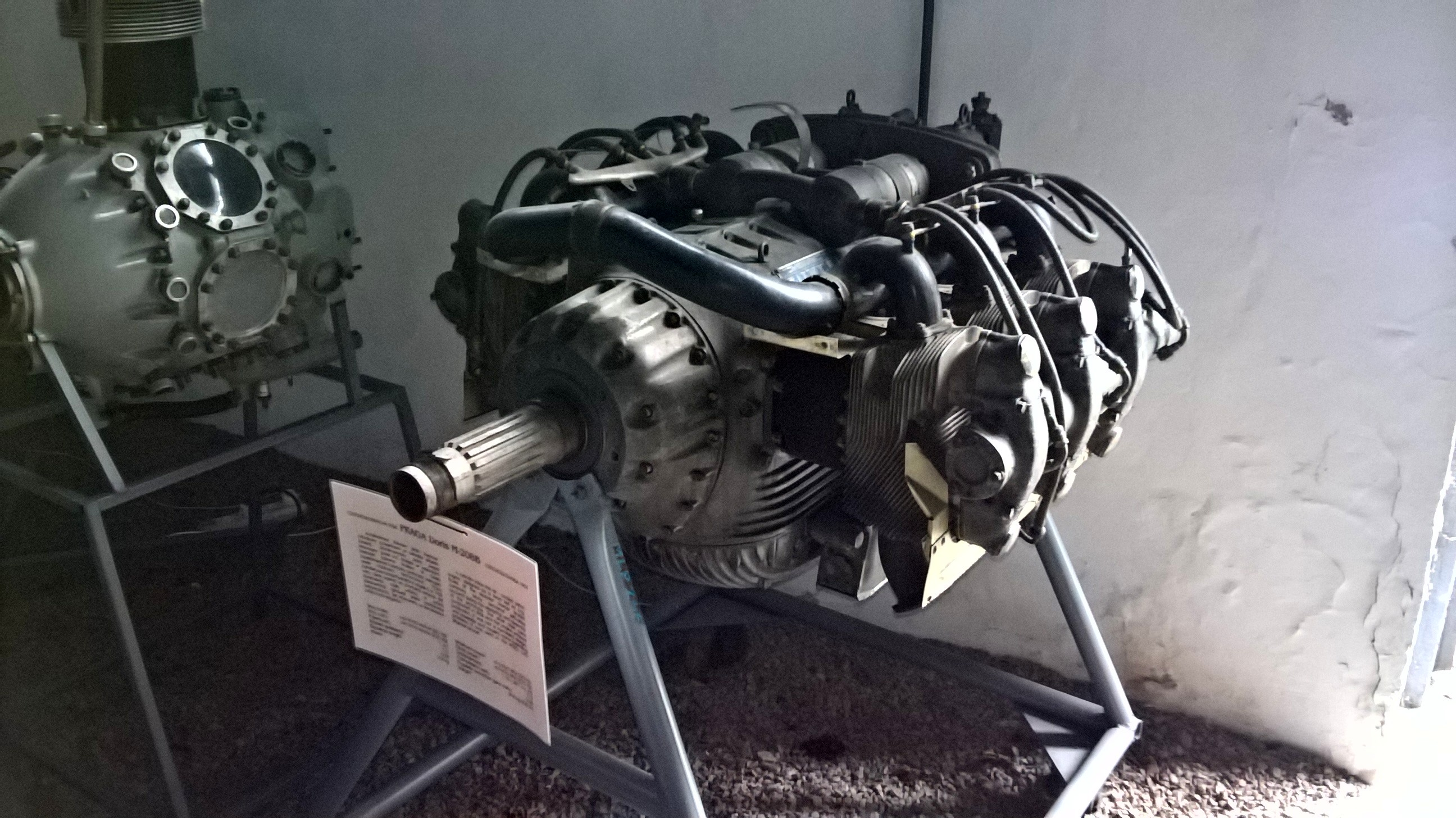 Czechosłowacki 6-cylindrowy silnik rzędowy Praga Doris M-208B z 1954 r., eksponowany w Muzeum Lotnictwa Polskiego w Krakowie.